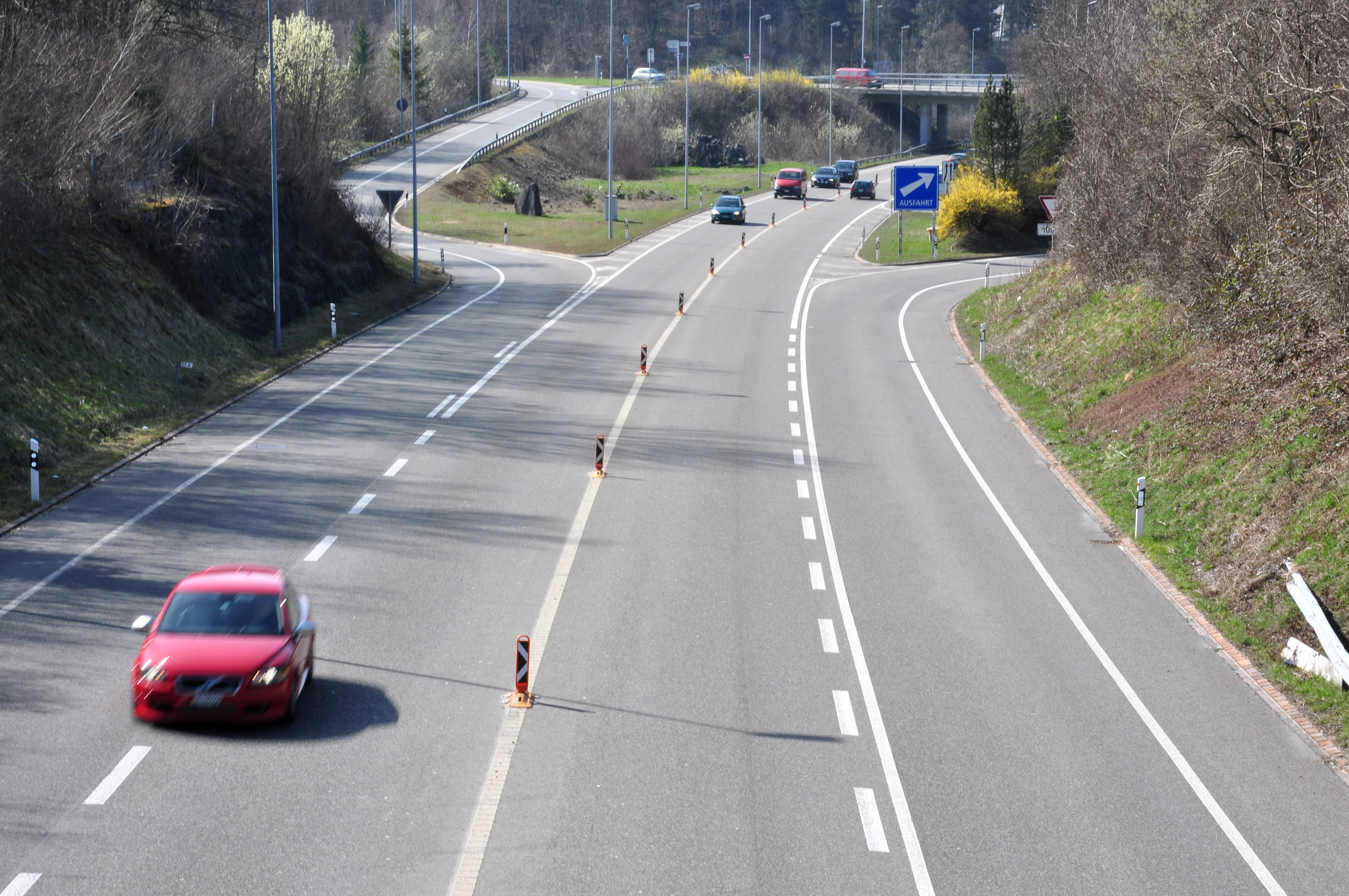 A53 motorway nearby Hüllistein and Martinsbrünneli between Jona and Rüti (Switzerland)